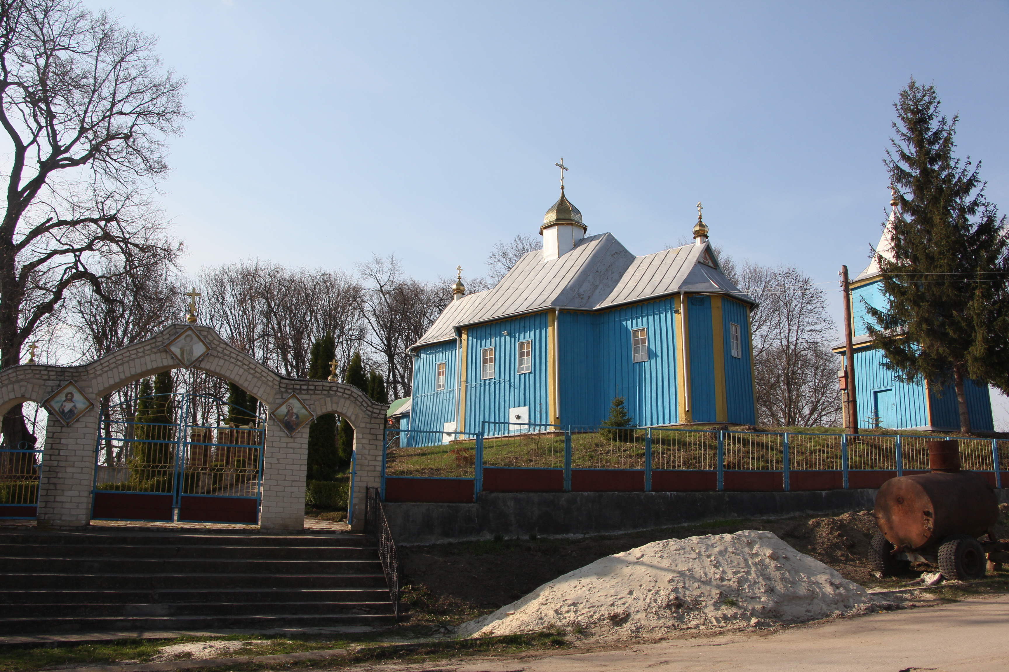 Дерев'яна церква в селі Гриньки Лановецького району, Тернопільської області